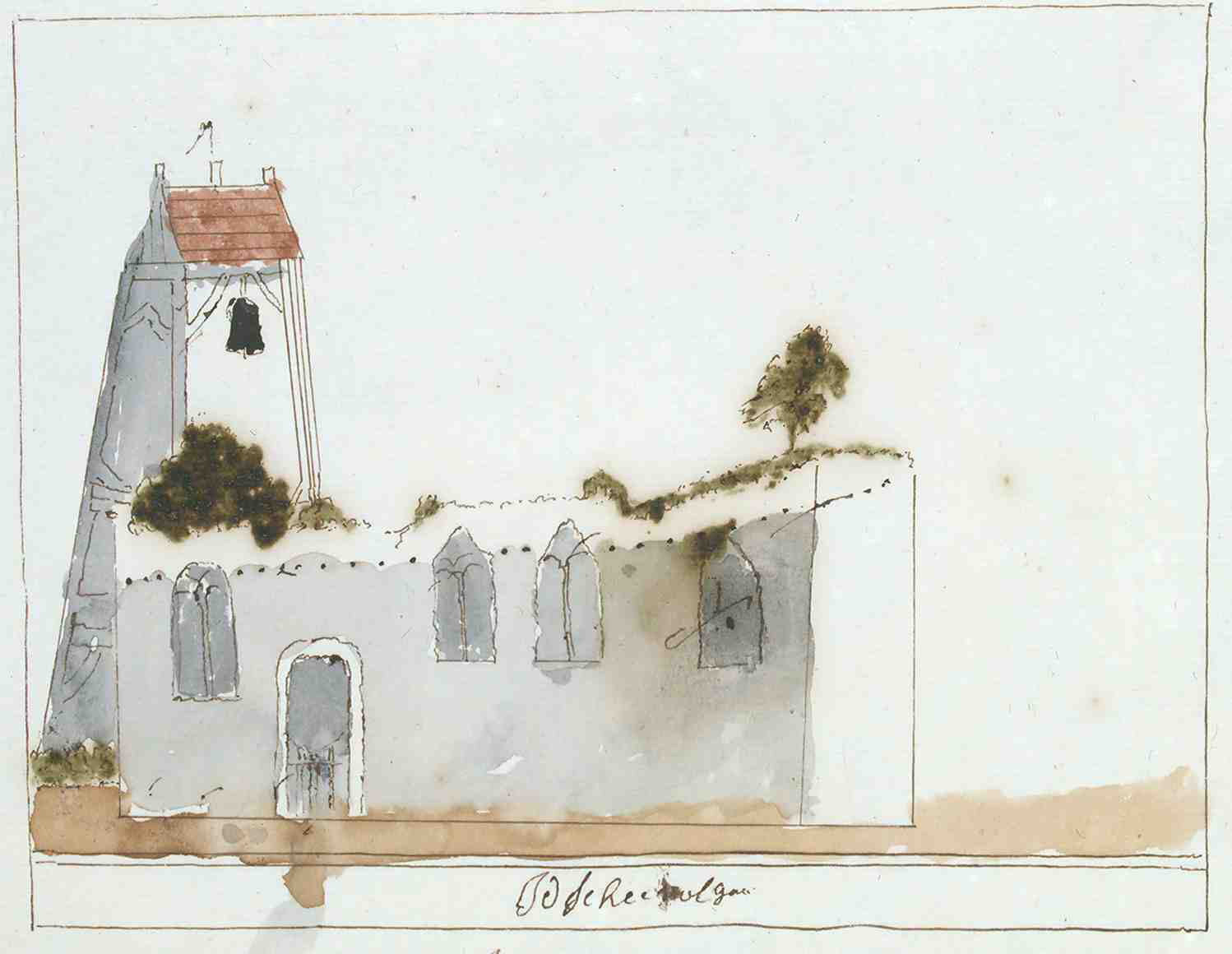 Korte Beschreijving van de Steden Dorpen Gehugten en Heeren-huizen der Heerlykheid Vriesland Benevens Desselfs Afbeeldingen Meest na 't leven getekent By een Vergaderdt Door Andries Schoemaker